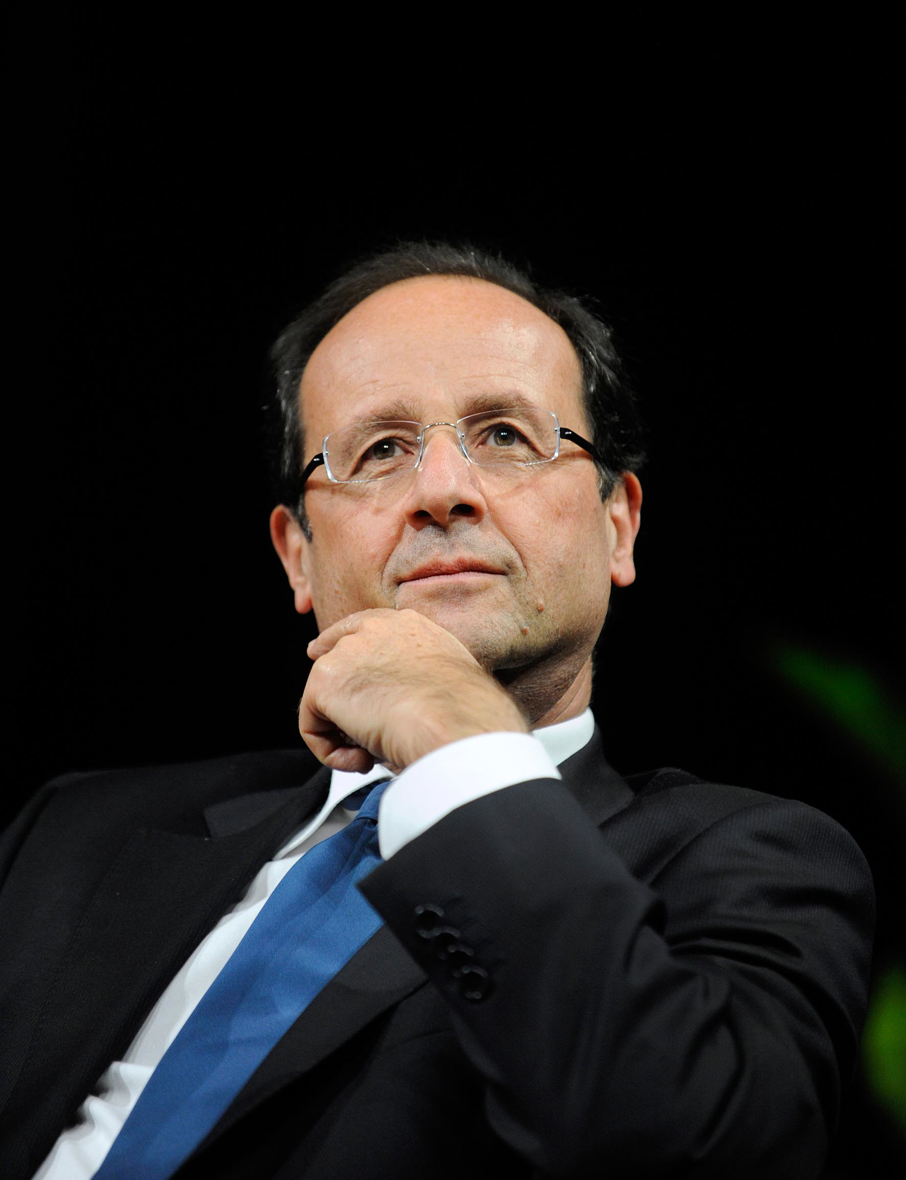 François Hollande aux Journées de Nantes, organisées par le Nouvel Observateur, La Cité, Nantes.